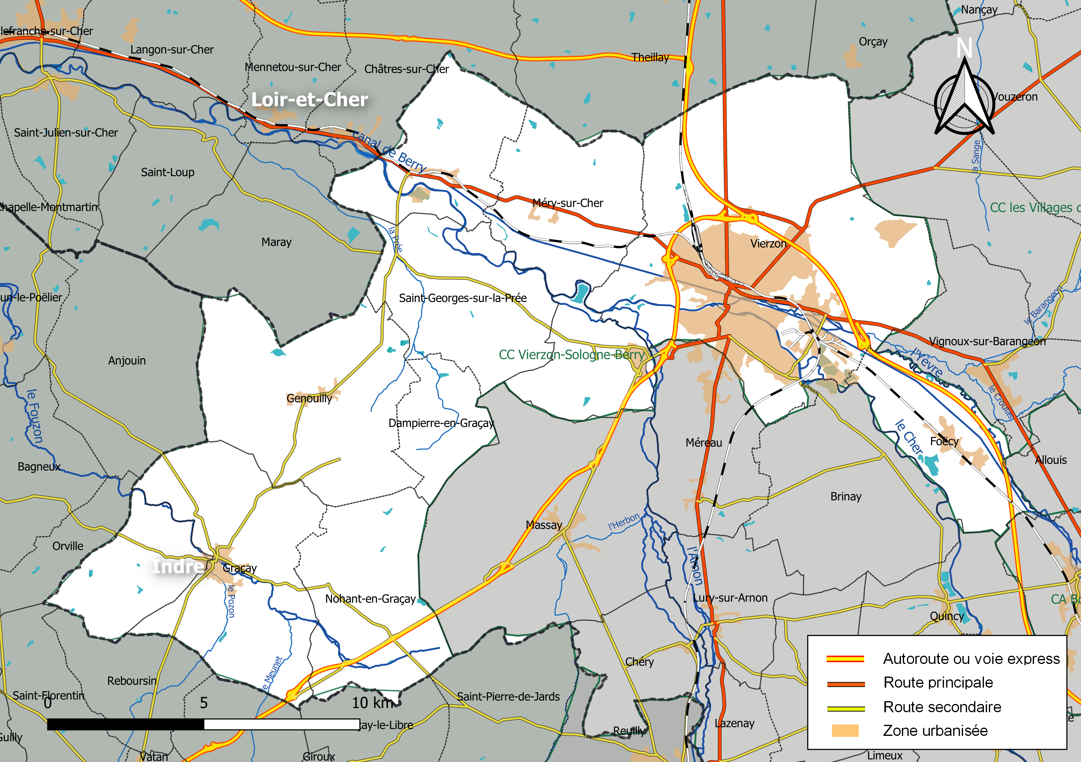 Carte géographique de la communauté de communes Vierzon-Sologne-Berry, département du Cher, France. Composition au 1er janvier 2019.